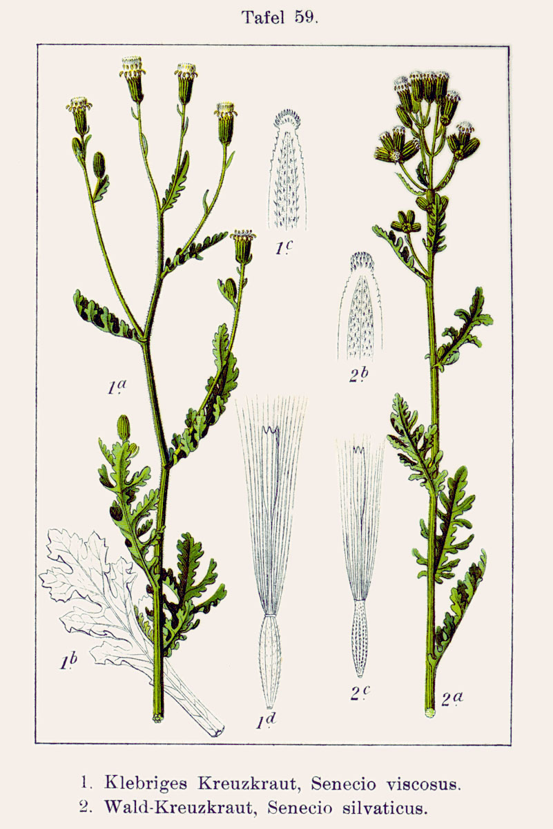 1. Senecio viscosus L. 2. Senecio sylvaticus L. Original Description 1. Klebriges Kreuzkraut, Senecio viscosus 2. Wald-Kreuzkraut, Senecio sylvaticus